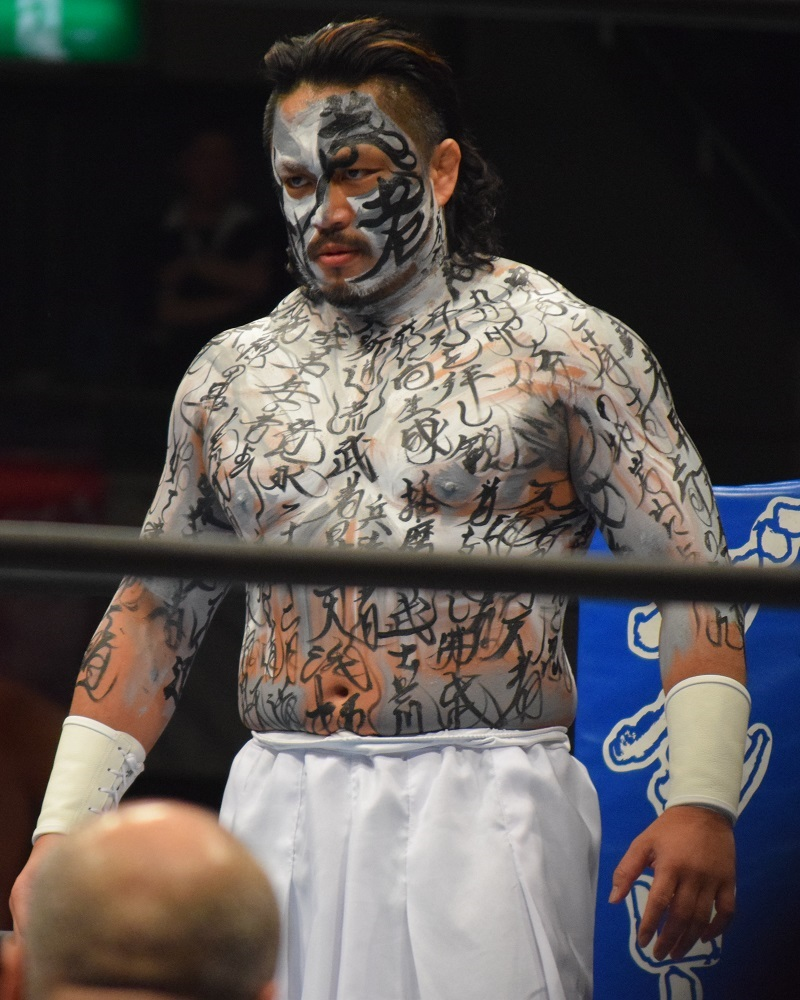 2016年2月11日 大阪府立体育会館 「THE NEW BEGINNING in OSAKA」 後藤洋央紀